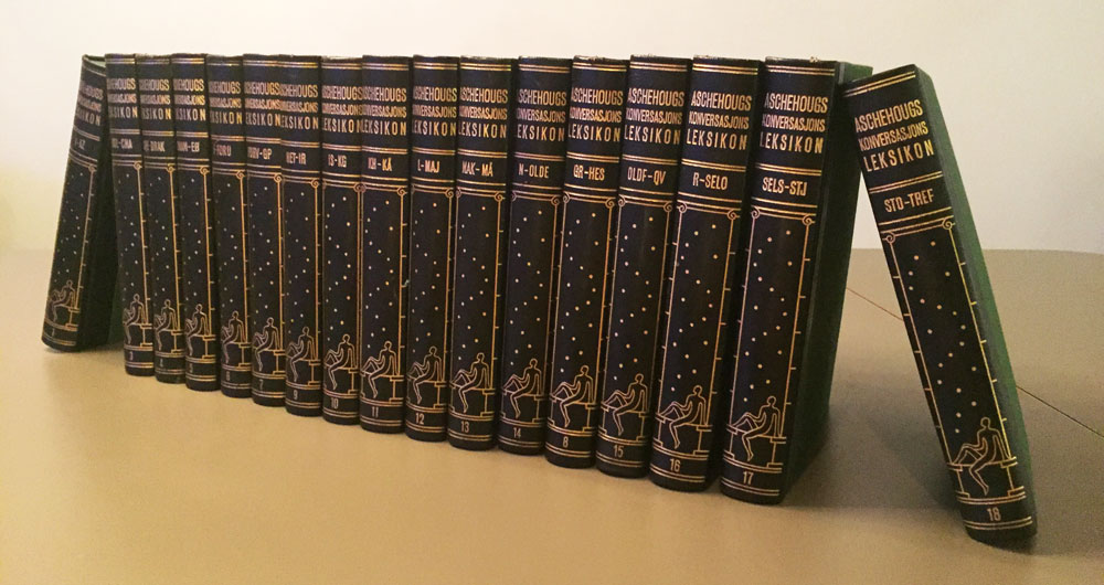 Aschehougs konversasjonsleksikon